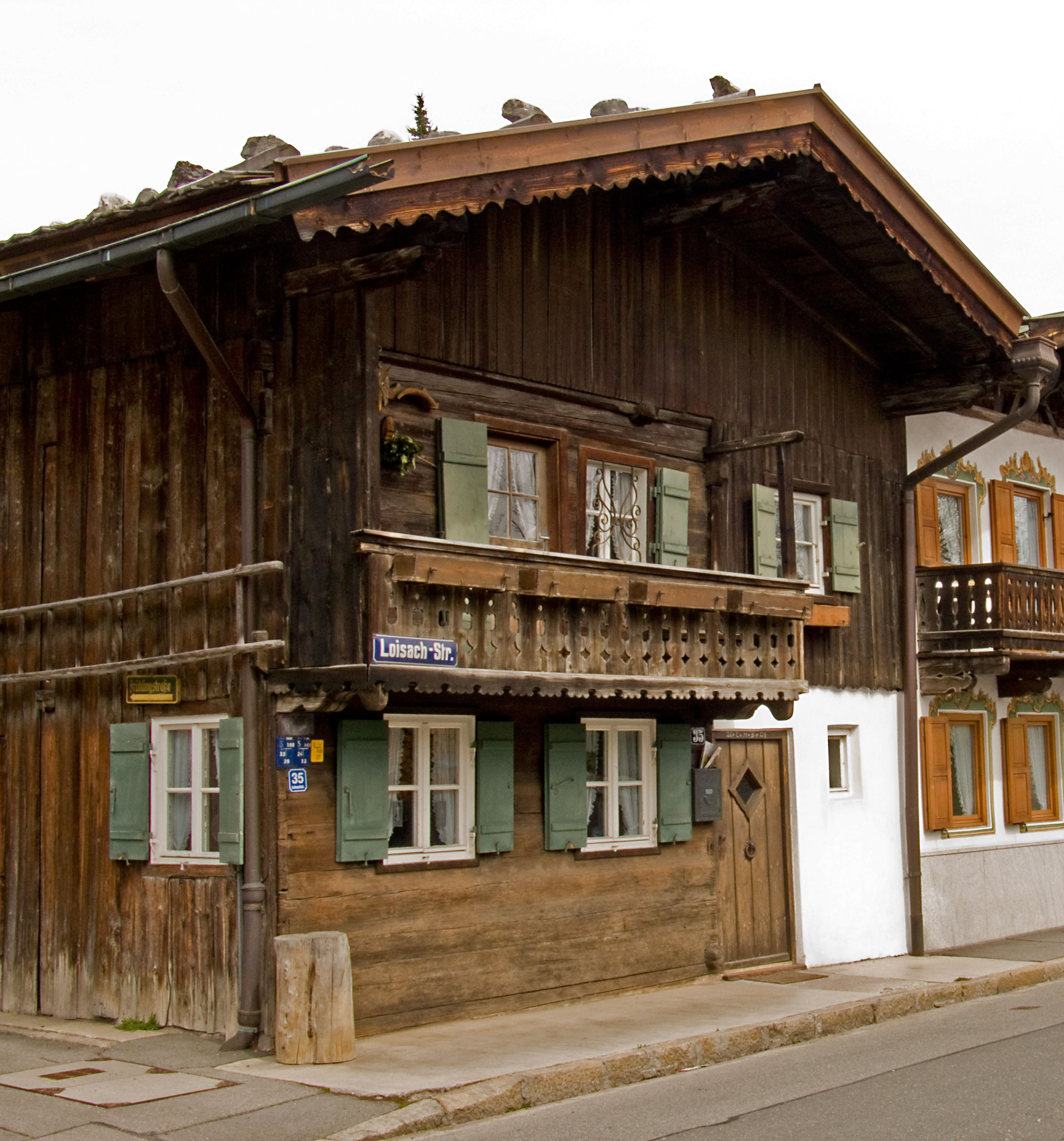 Das Anwesen Loisachstraße 35 in Garmisch